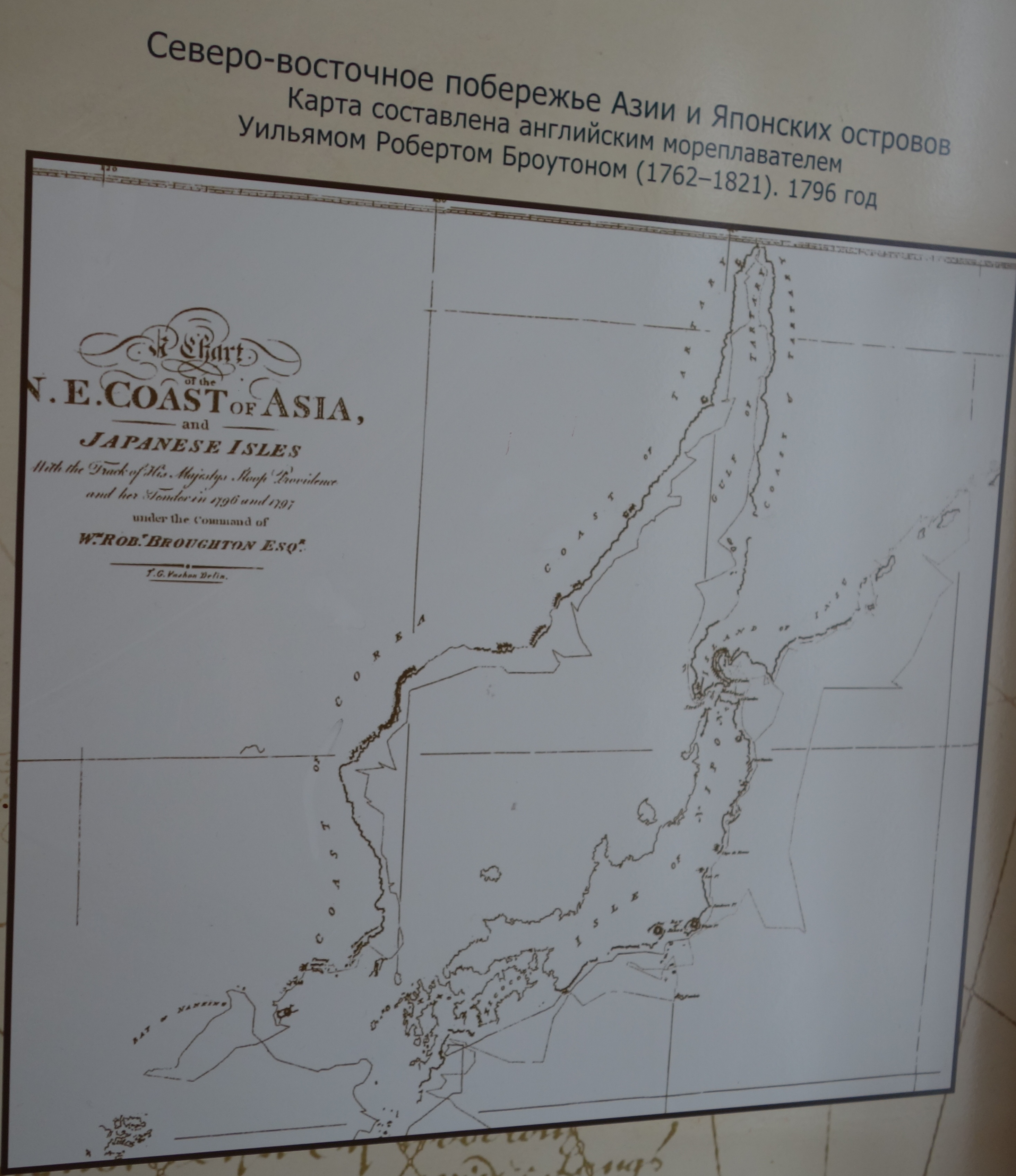 Карта Сахалина и Японии, составленная У. Броутоном в 1796 г. Снимок из экспозиции Сахалинского краеведческого музея.